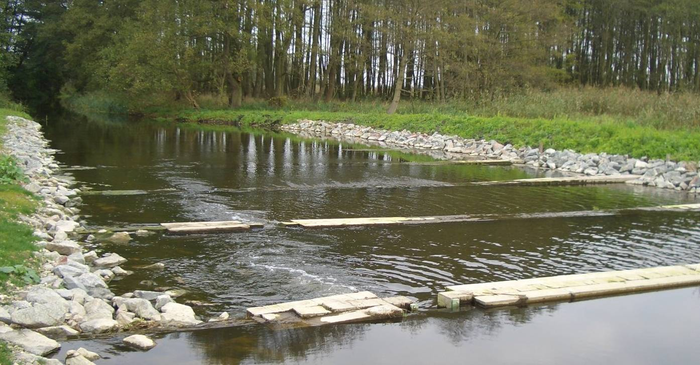 Blick auf den Mühlbach, der in den Galenbecker Sees mündet.